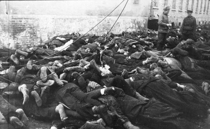 Zuchthaus Sonnenburg, ermordete Gefangene Zentralbild. II.Weltkrieg 1939-45. An der Front vor Küstrin, März 1945. Vor dem Anrücken der Roten Armee wurden im Zuchthaus Sonnenburg/Neumark 8.000 Insassen von den Faschisten in den Zuchthaushöfen ermordet. [Zuchthaus Sonnenburg (Neumark).- Sowjetische Soldaten zwischen ermordeten Häftlingen stehend]